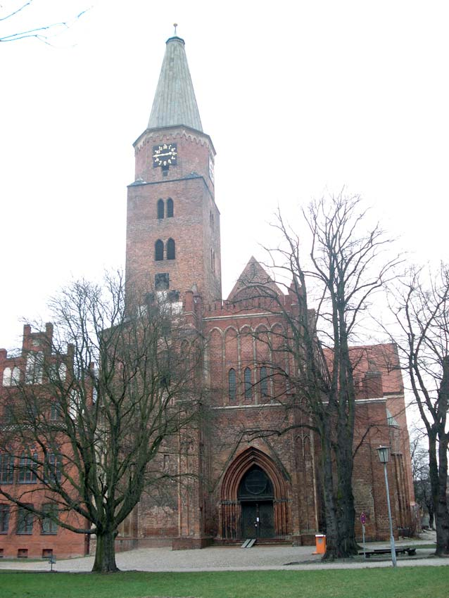 Der Dom St. Peter und Paul zu Brandenburg an der Havel